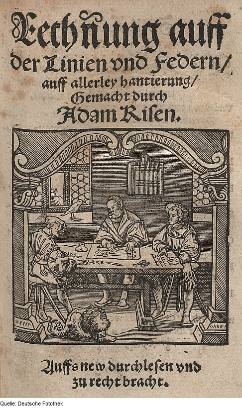 Original image description from the Deutsche Fotothek Mathematik & Rechnen